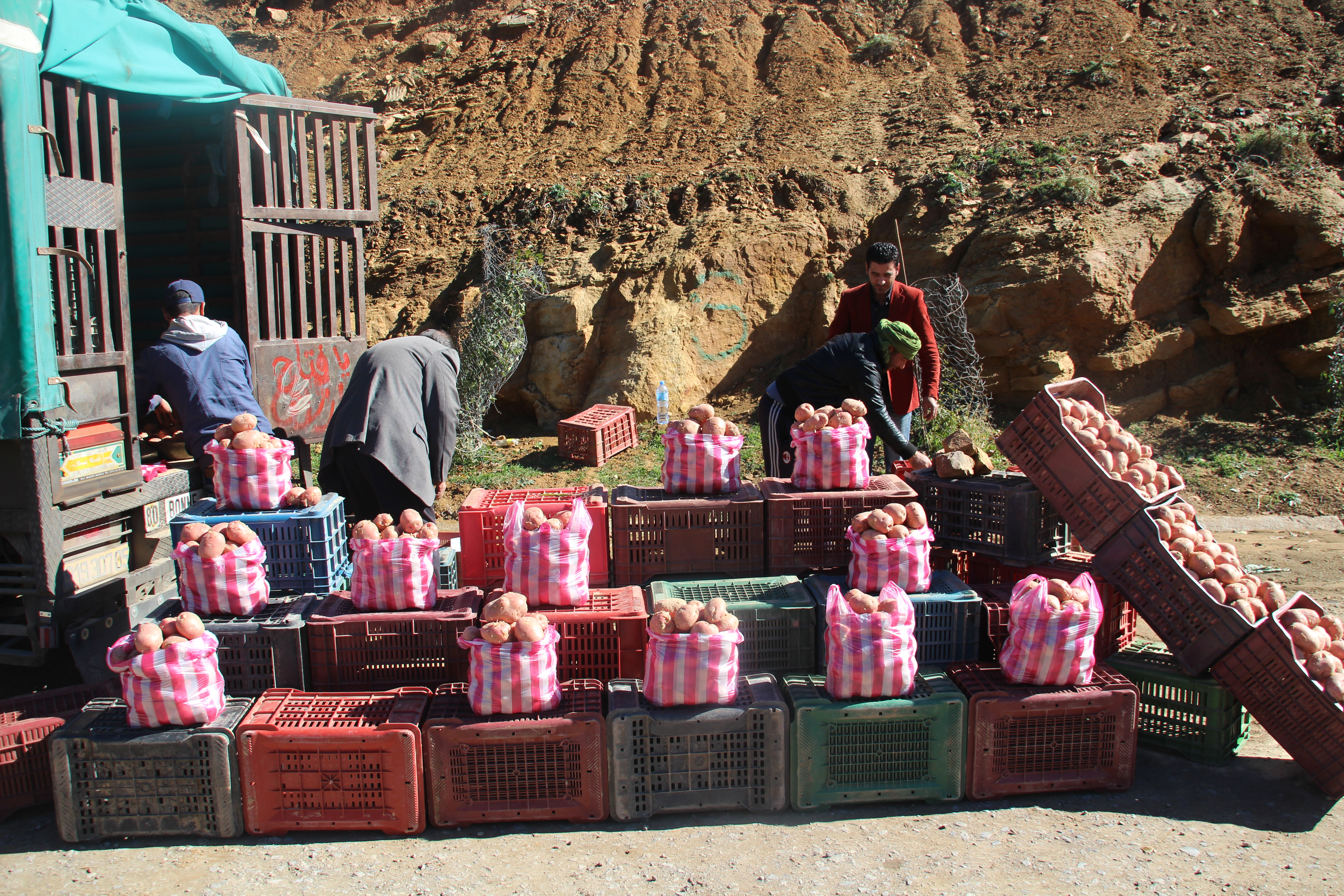 بائع البطاطا هو بائع متجول في منطقة مروانة باتنة الجزائر وهذه المهنة تسمى البائع المتجول وهي متوفرة بكثرة بالجزائر